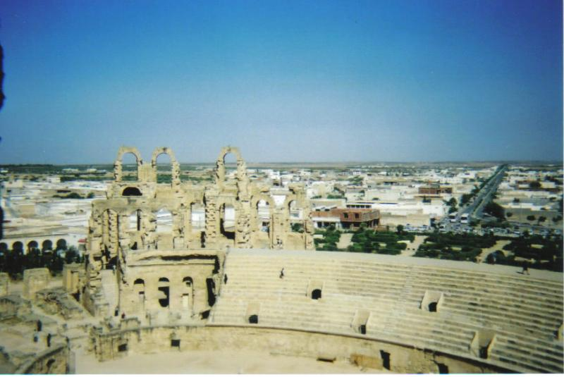 エル・ジェム